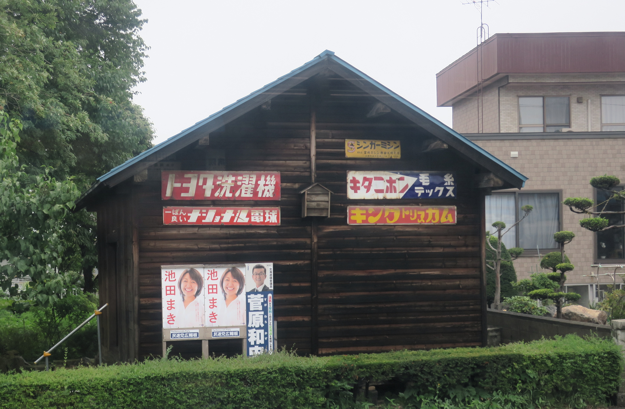 Near Shinrin Koen, Hokkaido.